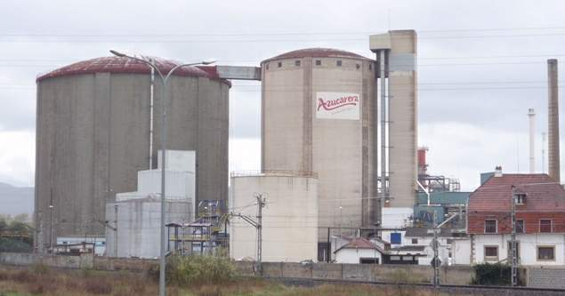 Azucarera de Miranda de Ebro (Burgos)